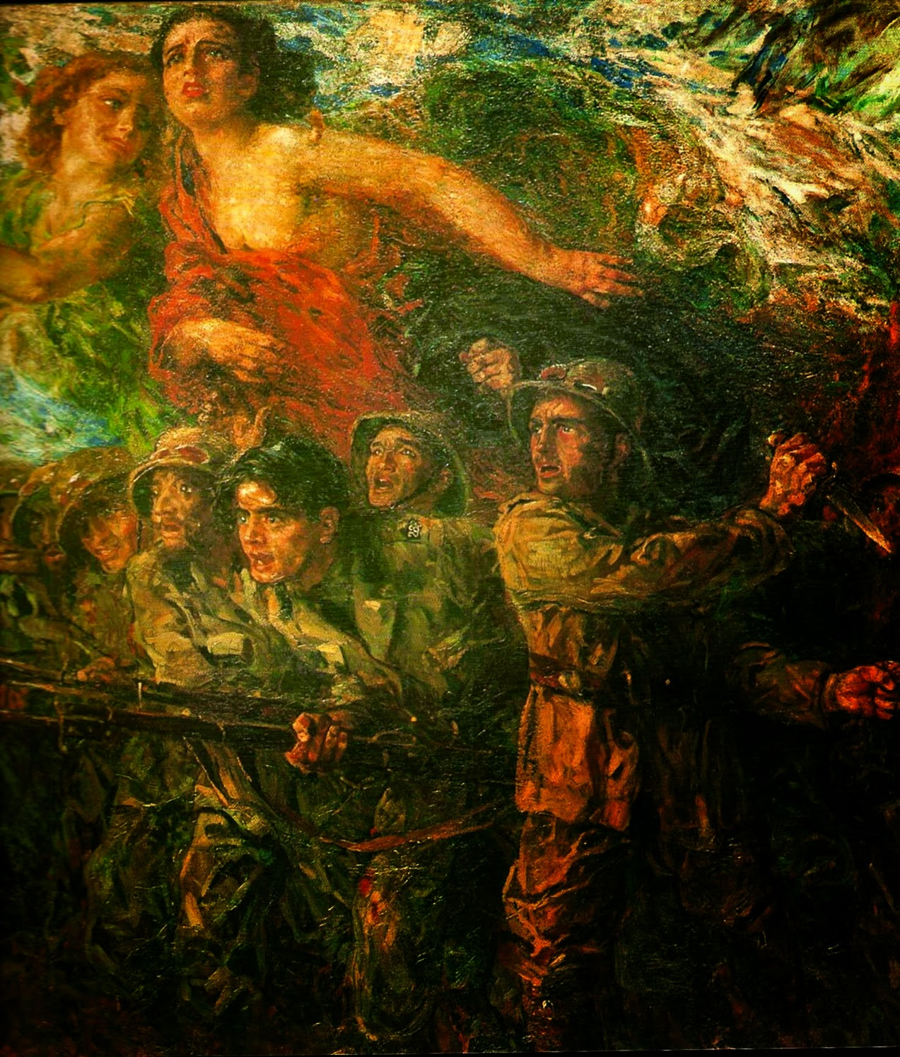 In Libia